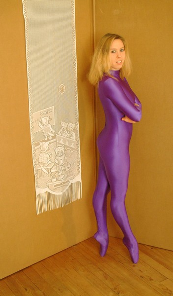 En pointe